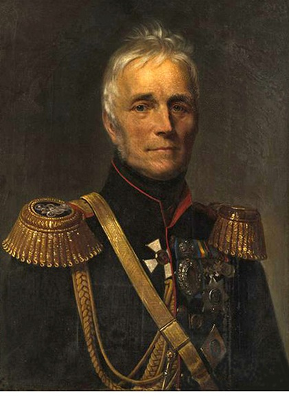 Тюрин Иван Алексеевич - Портрет князя Михаила Семёновича Воронцова